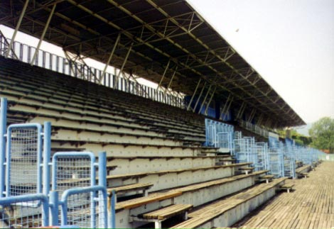 NK Zagreb stadium: Kranjceviceva